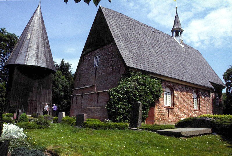 Katharineheed Kirke i Sydslesvig. Katharinenheerd kirke